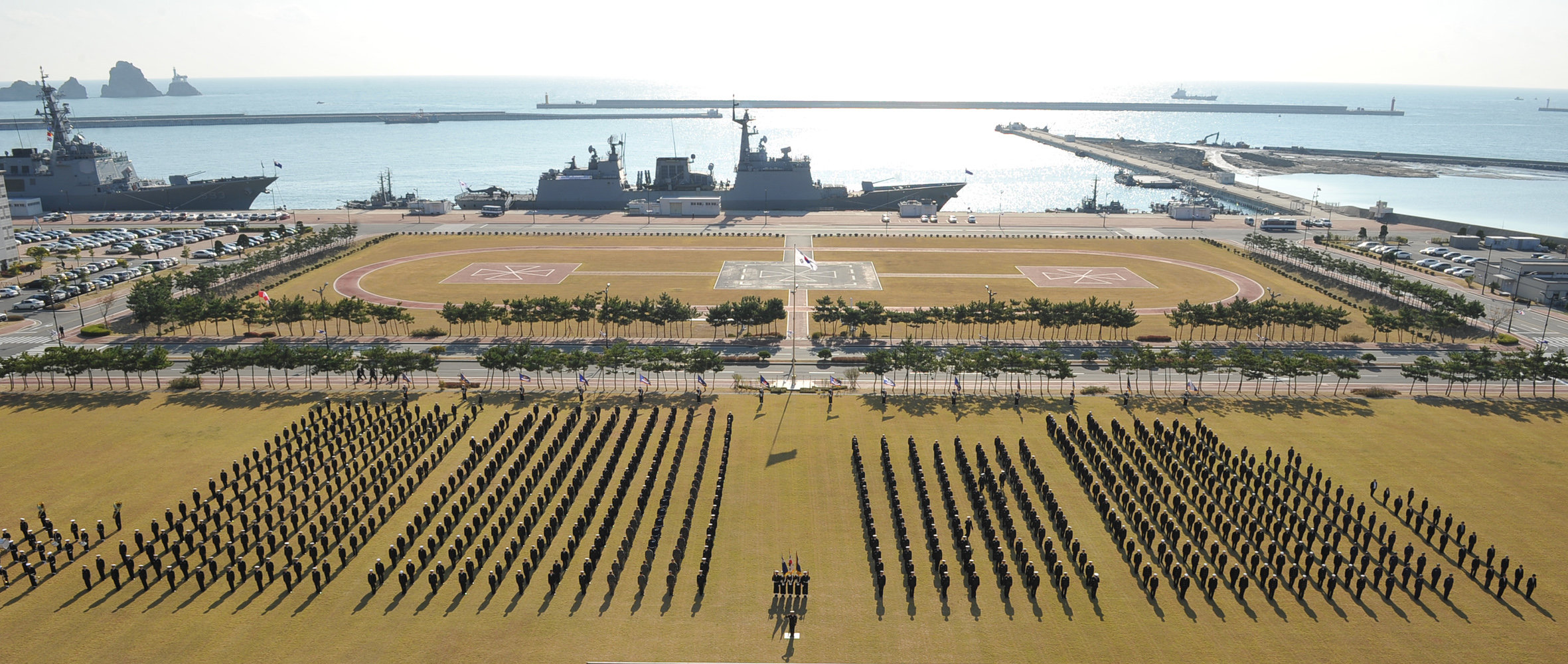 소말리아 해역에서 187일간 우리나라 선박 등의 보호 임무를 수행한 해군 청해부대 13진이 5일 오전 부산작전기지로 귀항했다. 지난 5월 3일 파병된 청해부대 13진은 27차례 국내외 선박 83척을 호송하고 718척의 항해를 지원했다. 촬영자 : 배준호